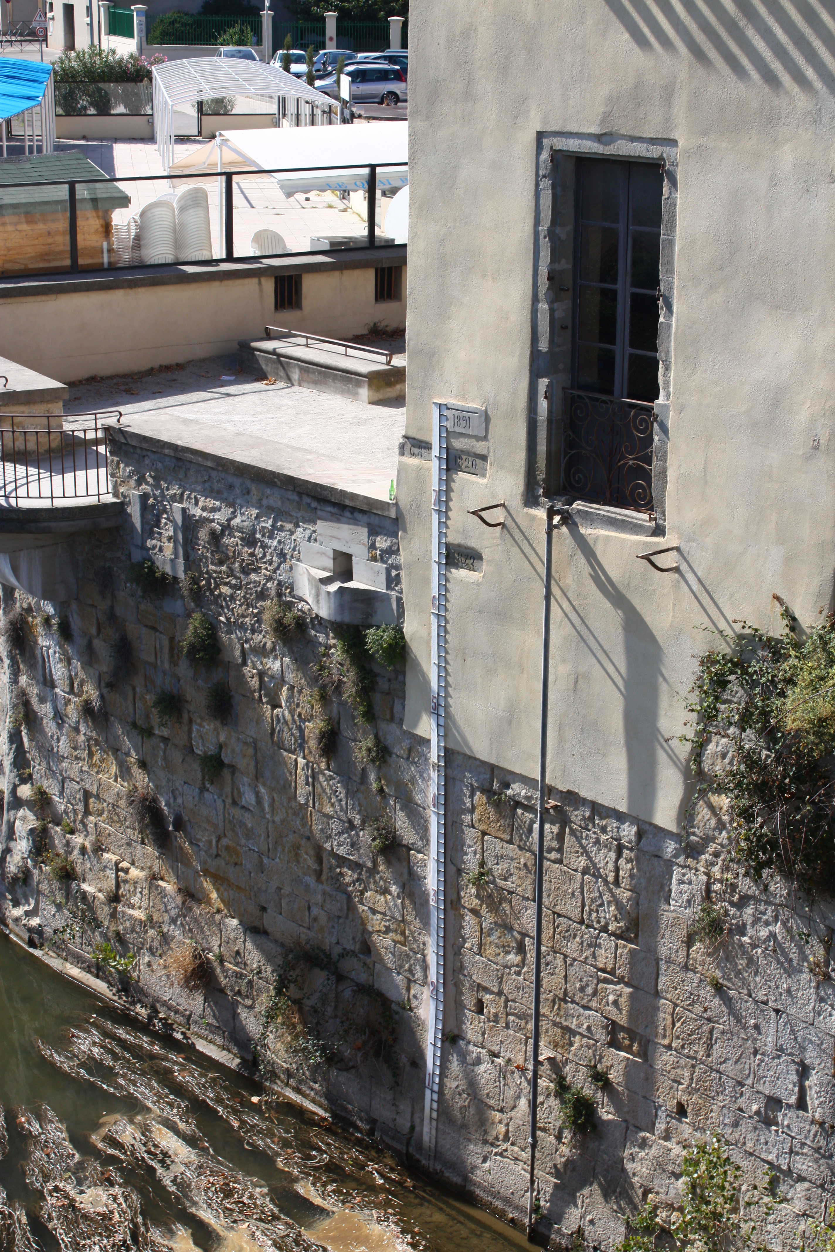 Carcassonne